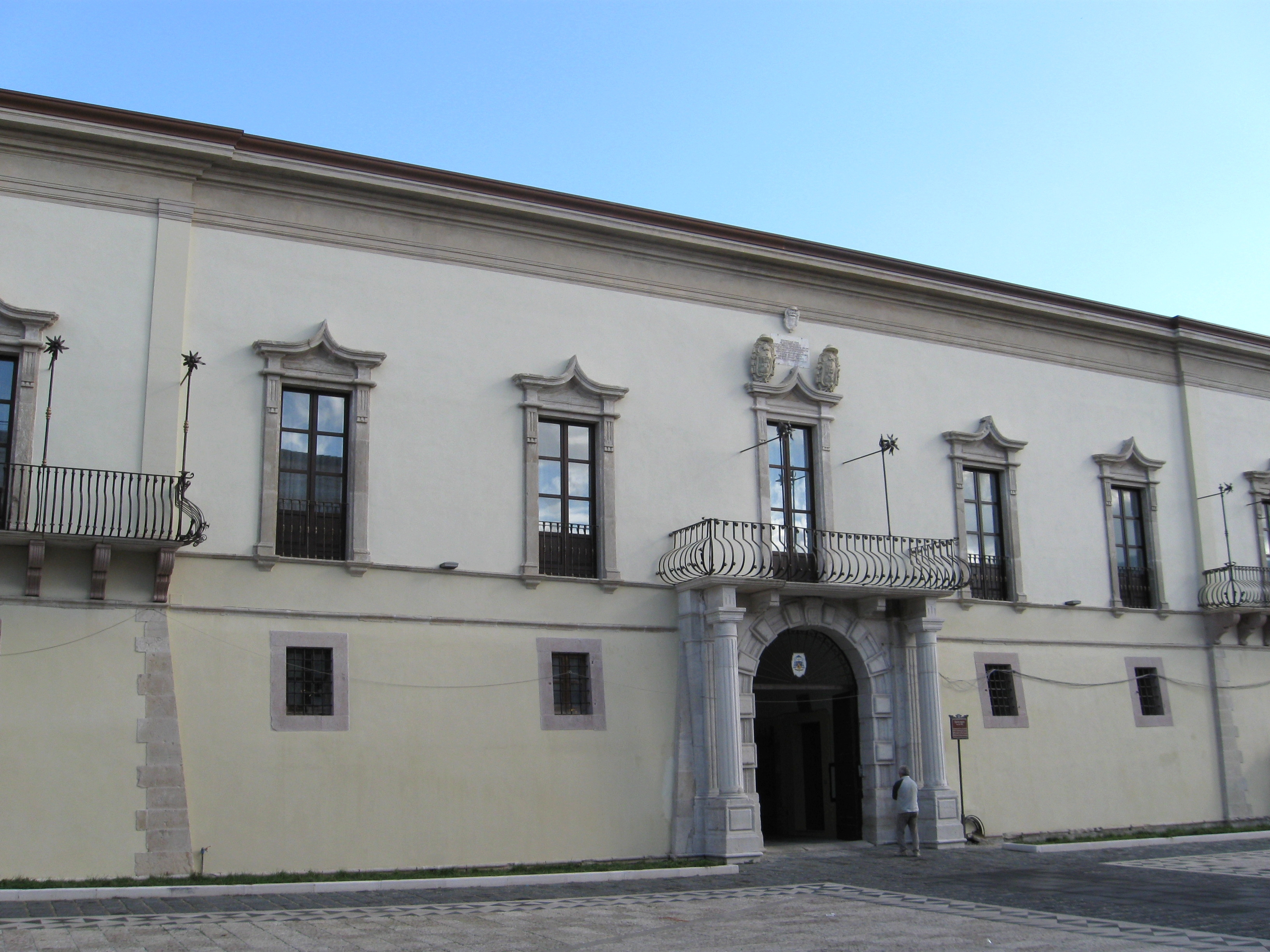 Palazzo del Vescovado, Melfi, Basilicata